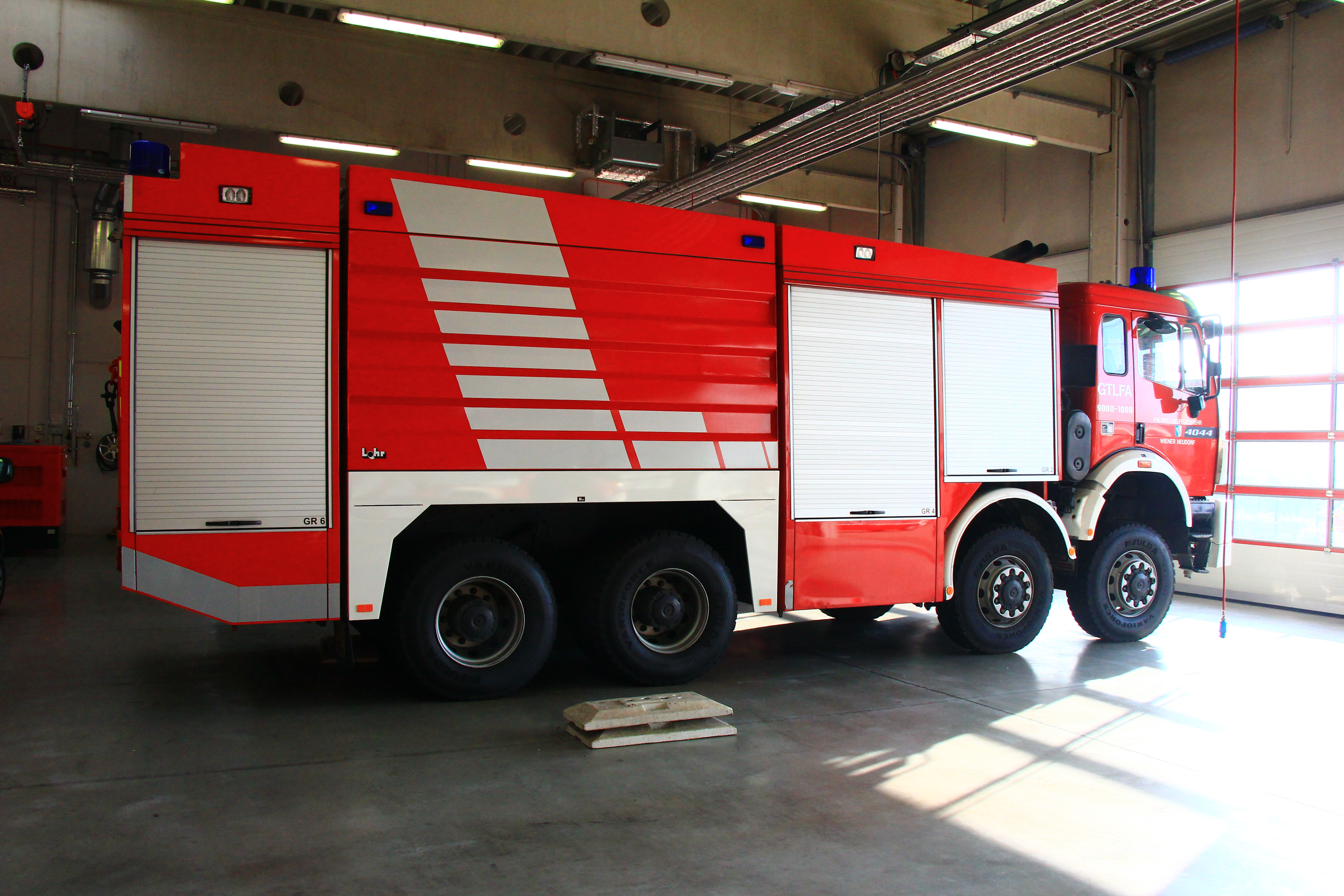 Großtanklöschfahrzeug GTLF 9000-1000 der FF Wiener Neudorf